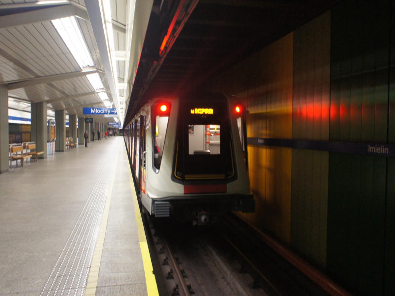 Siemens Inspiro (pociąg numer 51) odjeżdża ze stacji A3 Imielin podczas swojego inauguracyjnego przejazdu na trasie Kabaty-Młociny.